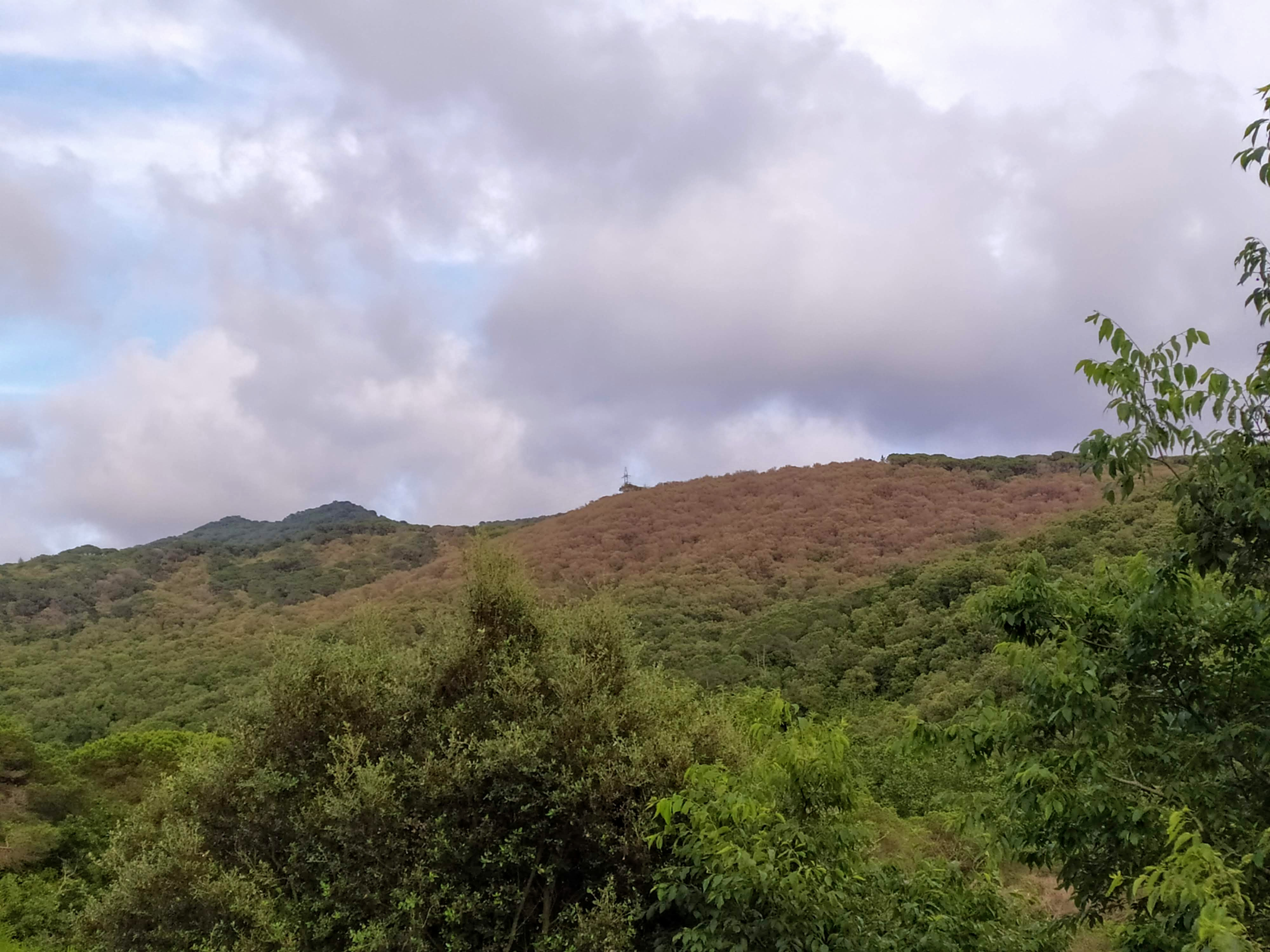 Serres del Litoral Septentrional This is a photography of a Special Area of Conservation in Spain with the ID: ES5110011. Natura2000 entry, EEA entry